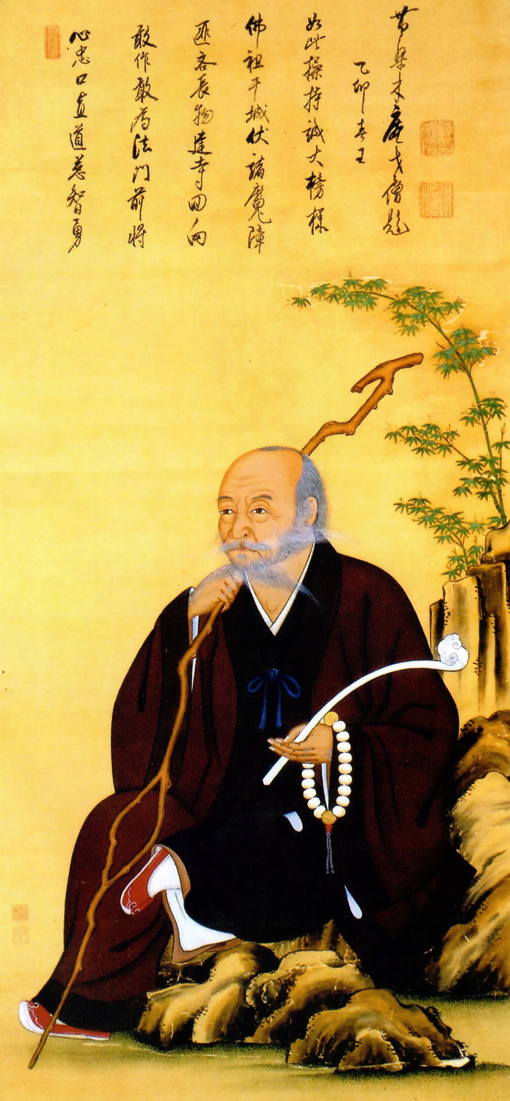 青木重兼の肖像。